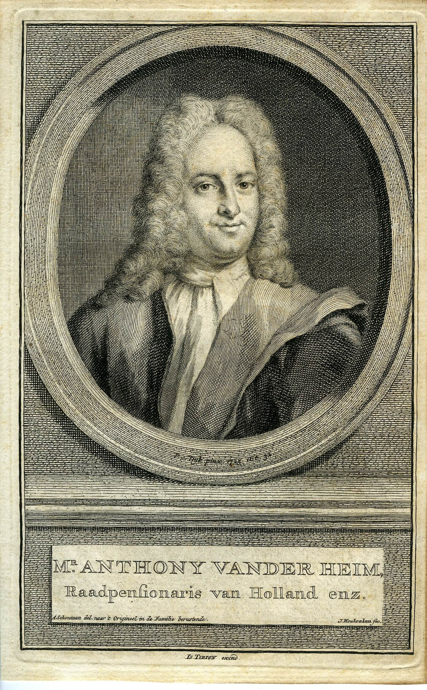 Een prent met de afbeelding van het portret van Anthonie van der Heim in een medaillon. Onder op de medaillon: "P. v. Dyk pinx 1725 oct. 3(2?)". Onder het portret in een rechthoekig kader: "Mr. Anthony vander Heim, Raadspensionaris van Holland enz. A. Schouman del. naar 't Origineel in de familie berustende. J. Houbraken fec.". Geheel onderaan: "Is. Tirion excud.".